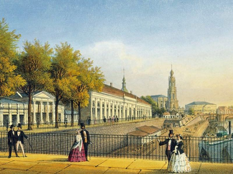 Die Galerie auf der Brühlschen Terrasse in Dresden, um 1800